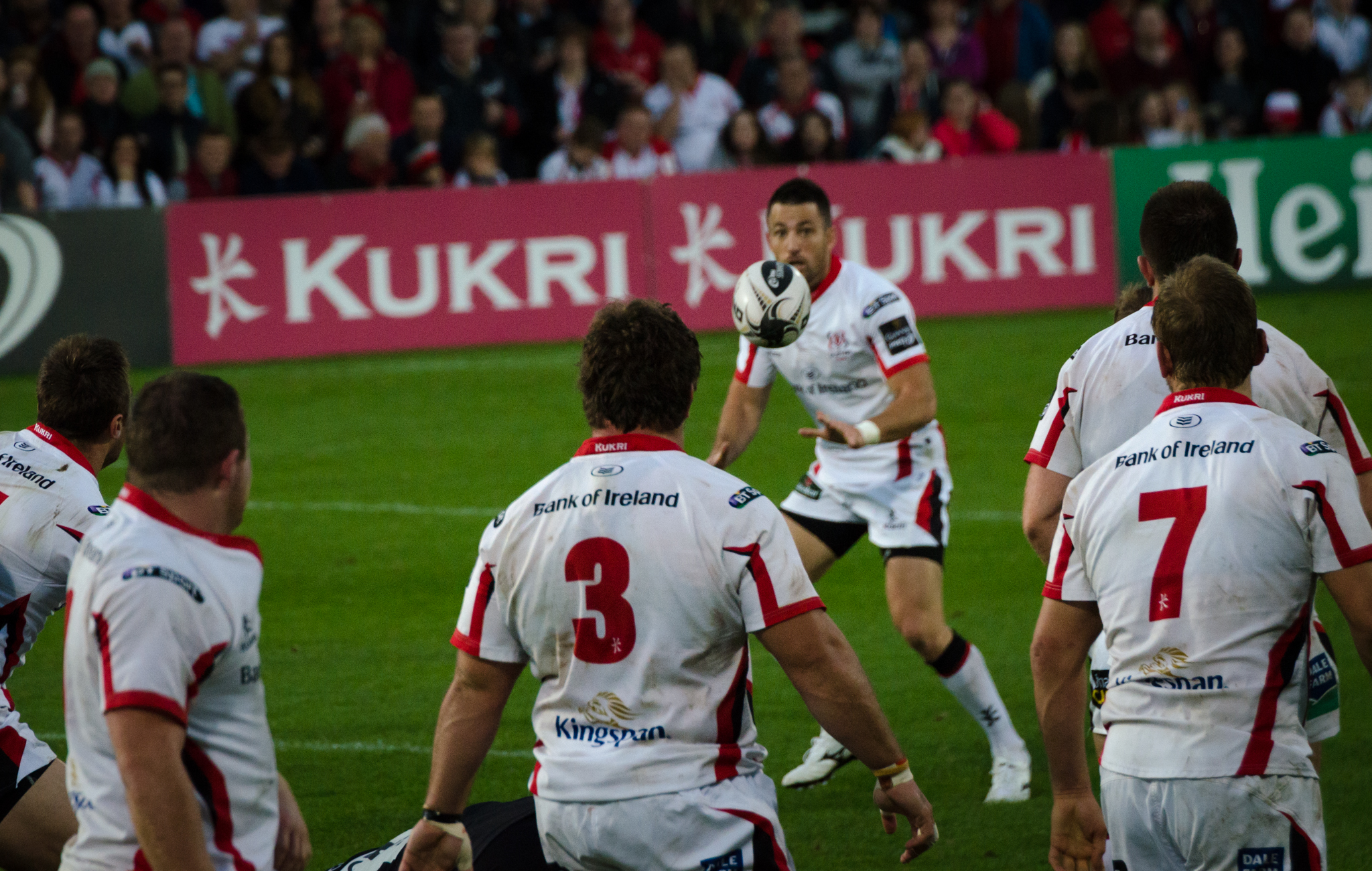 Ulster Rugby